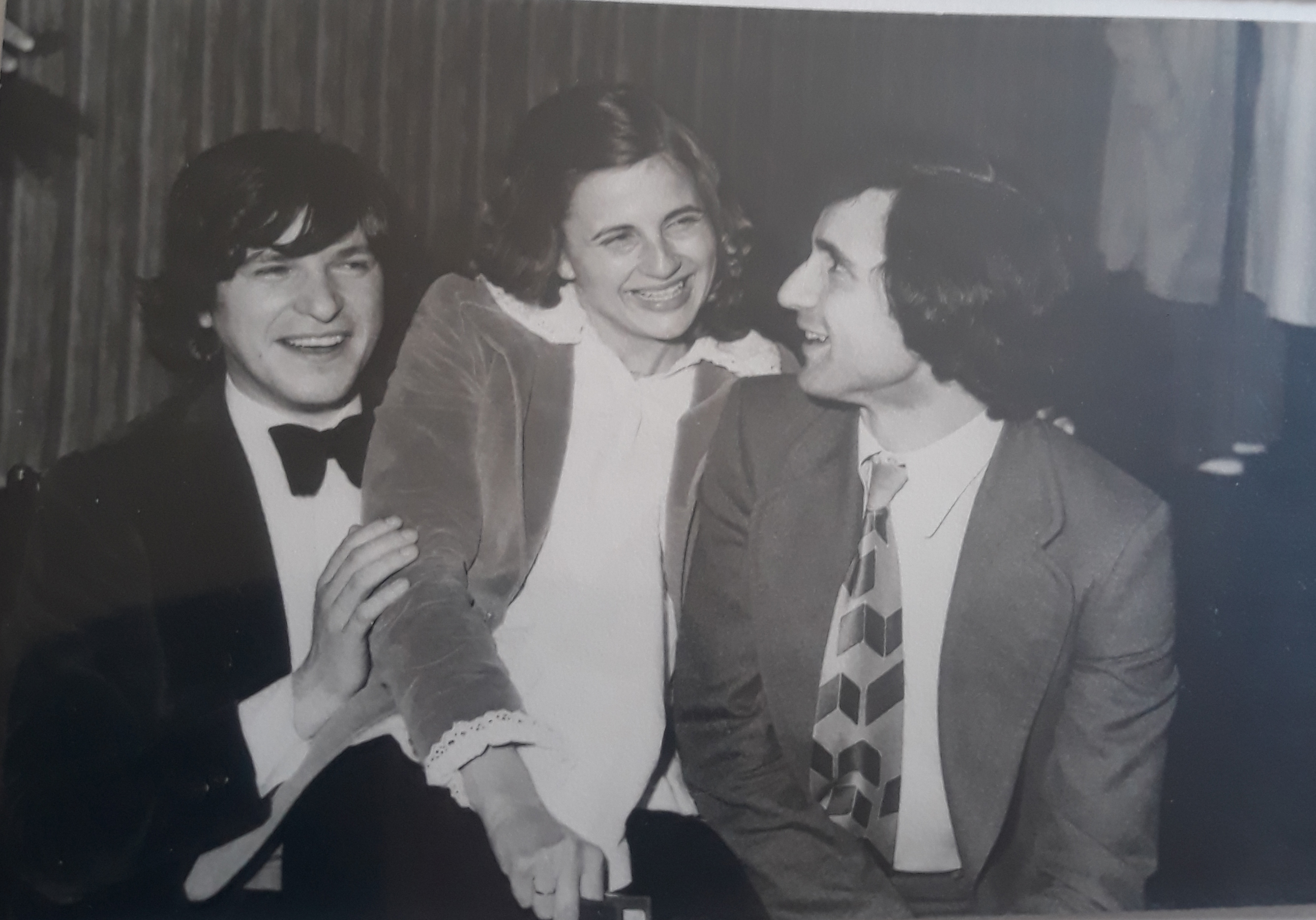 petit flirt avec rouvier et kantorov